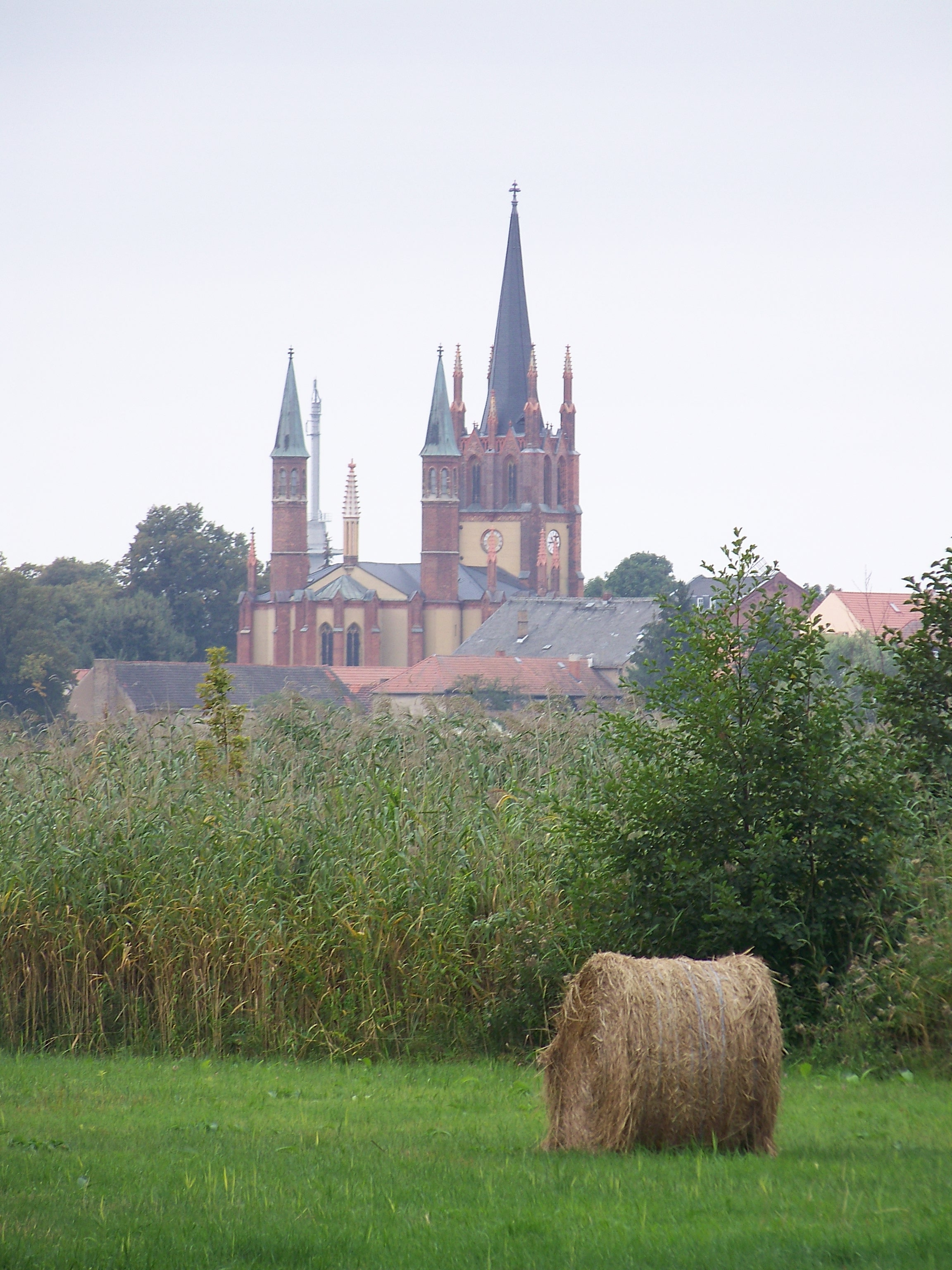 Blick nach Werder vom Werderschen Damm aus.